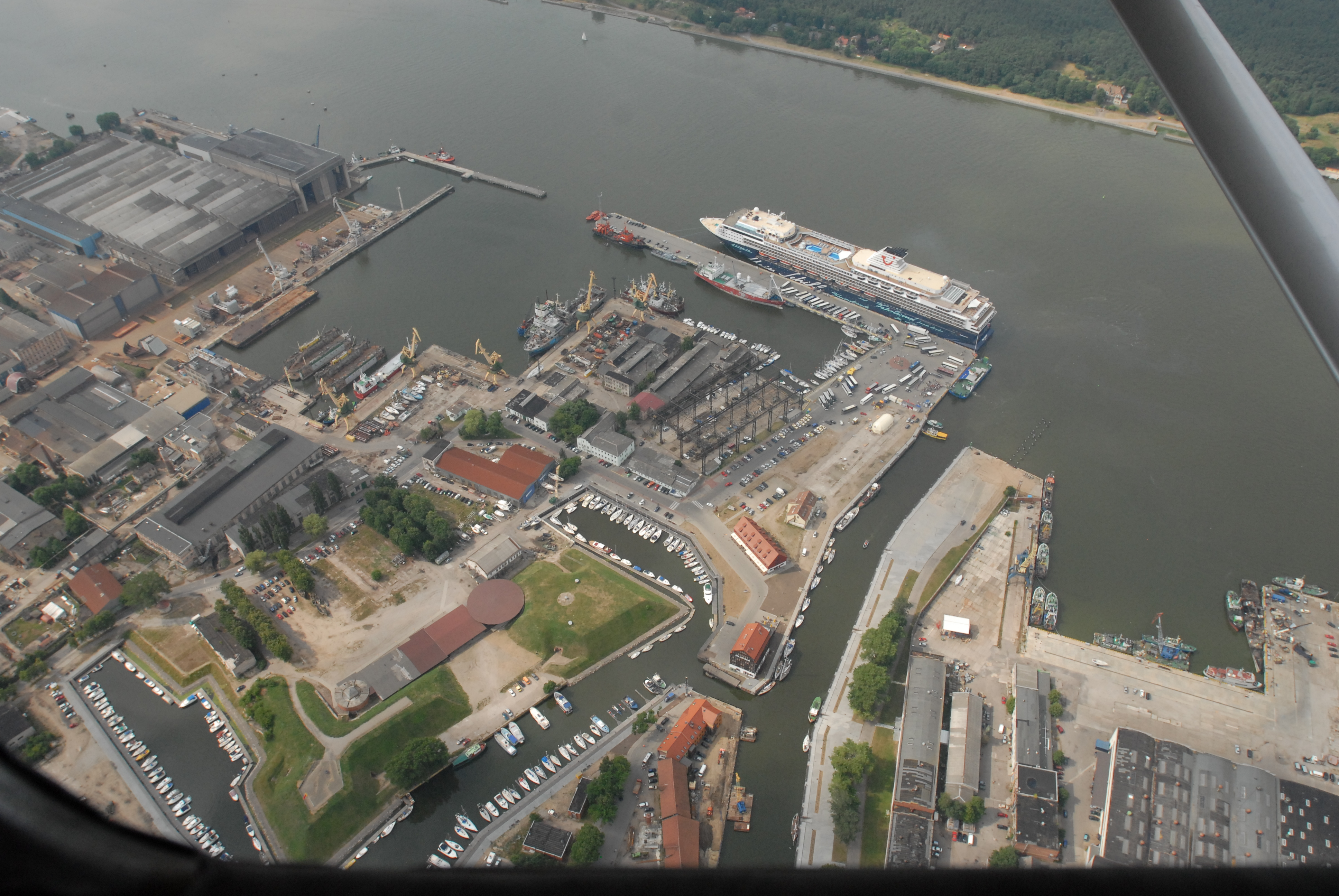 Hradiště Klaipėdského hradu a ústí Danė do Kuršského zálivu v Klaipėdě. Letecký snímek od severovýchodu